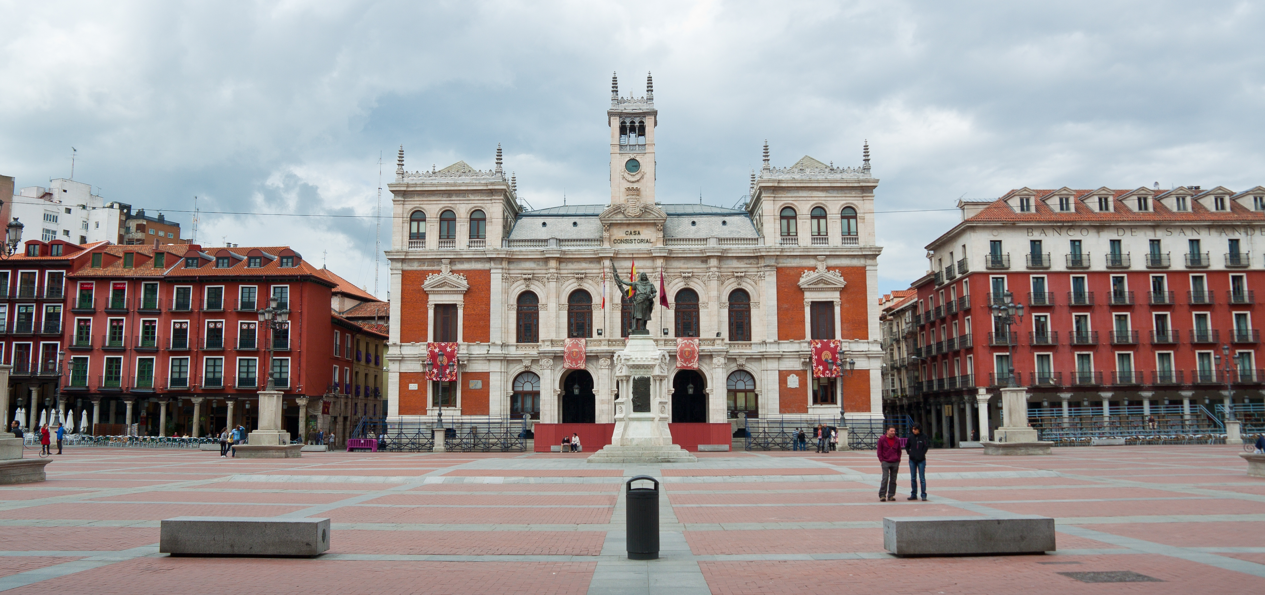 Conjunto Histórico de Valladolid